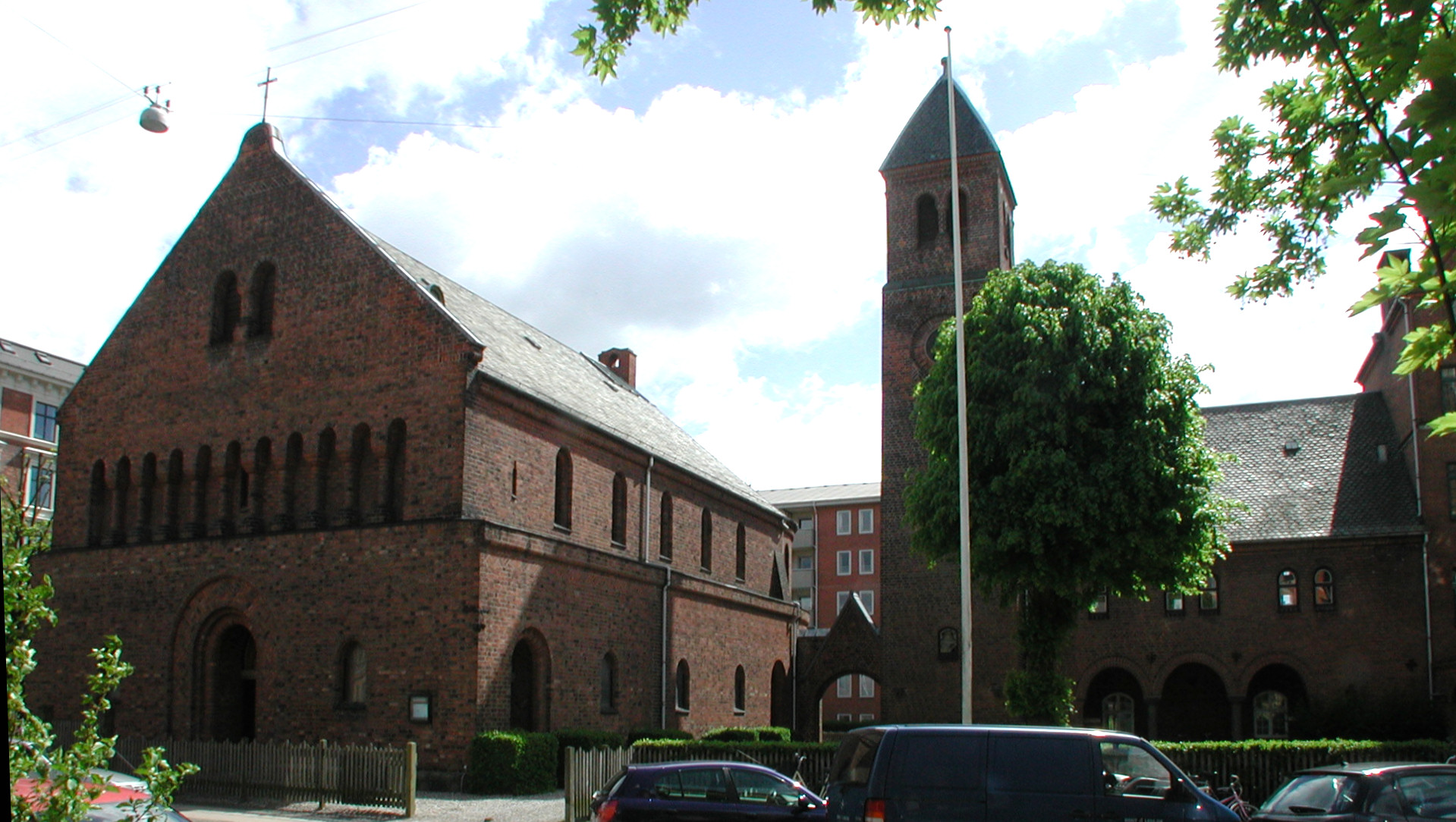 Immanuelskirken, Copenhagen, Denmark.